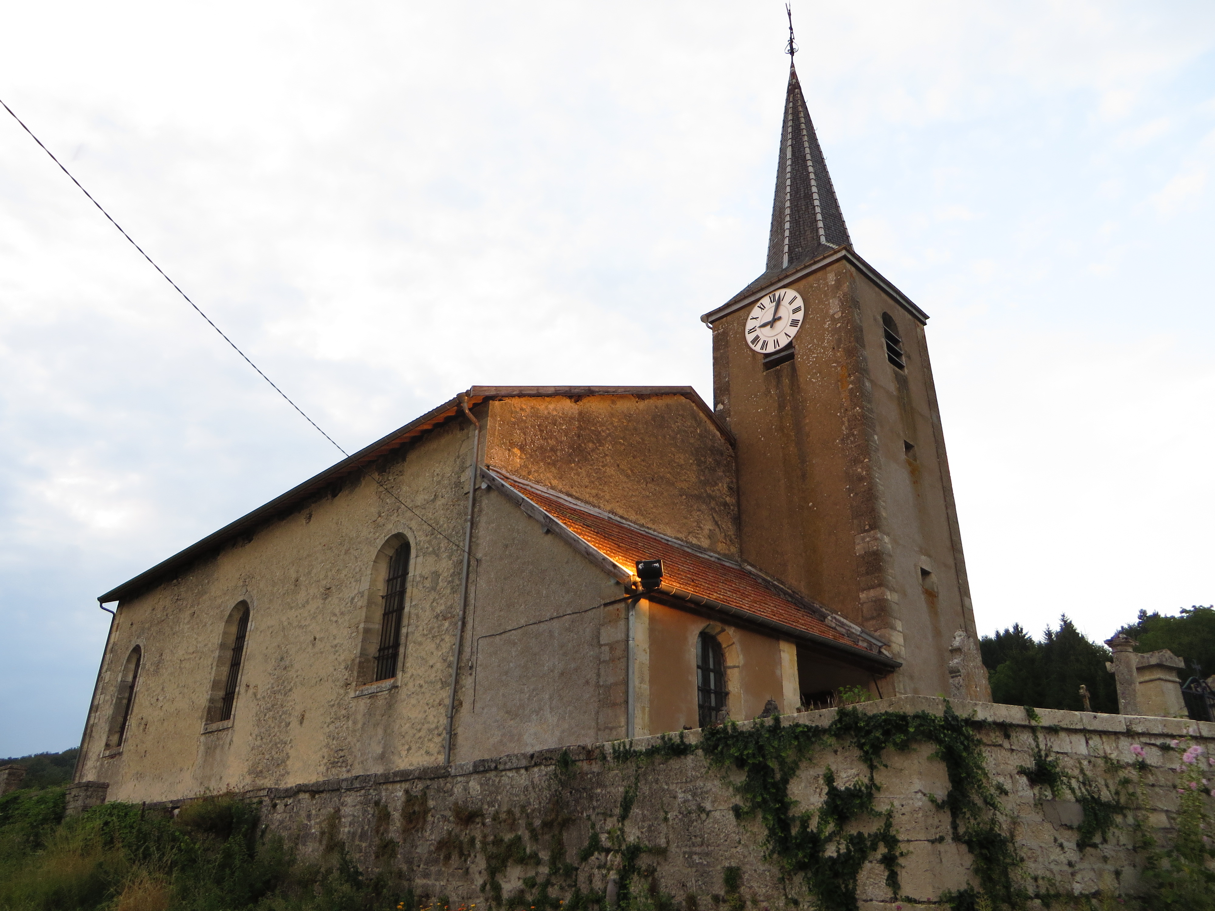 Fontaines-Saint-Clair Église Saint-Michel